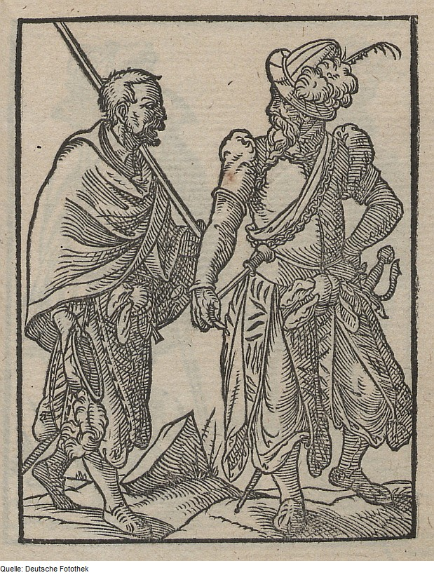 Original image description from the Deutsche Fotothek Ständebuch & Amt & Militär & Hauptmann